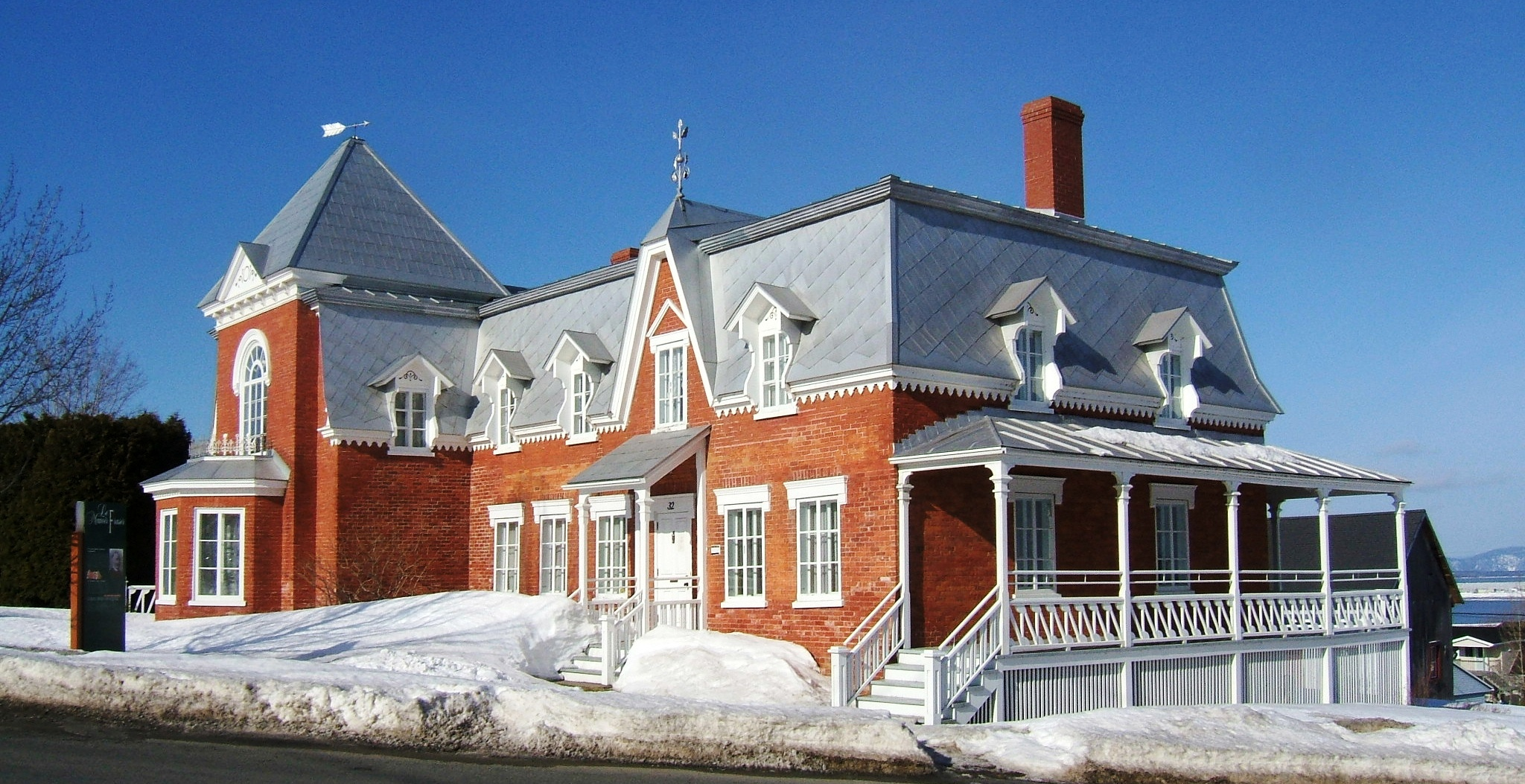 Manoir Fraser à Rivière-du-Loup (Québec, Canada).